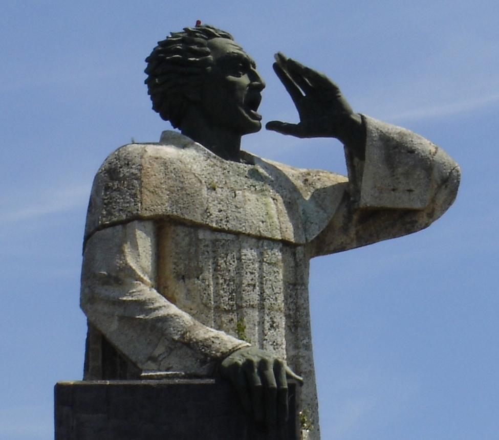 Es una estatua hecha en piedra y bronce que tiene una altura de 15 m, fue realizada por el escultor mexicano Antonio Castellanos Basich, y donada por el gobierno de México al pueblo de la República Dominicana. Inaugurada el año 1982, se halla ubicada en el paseo marítimo Malecón de la ciudad de Santo Domingo.